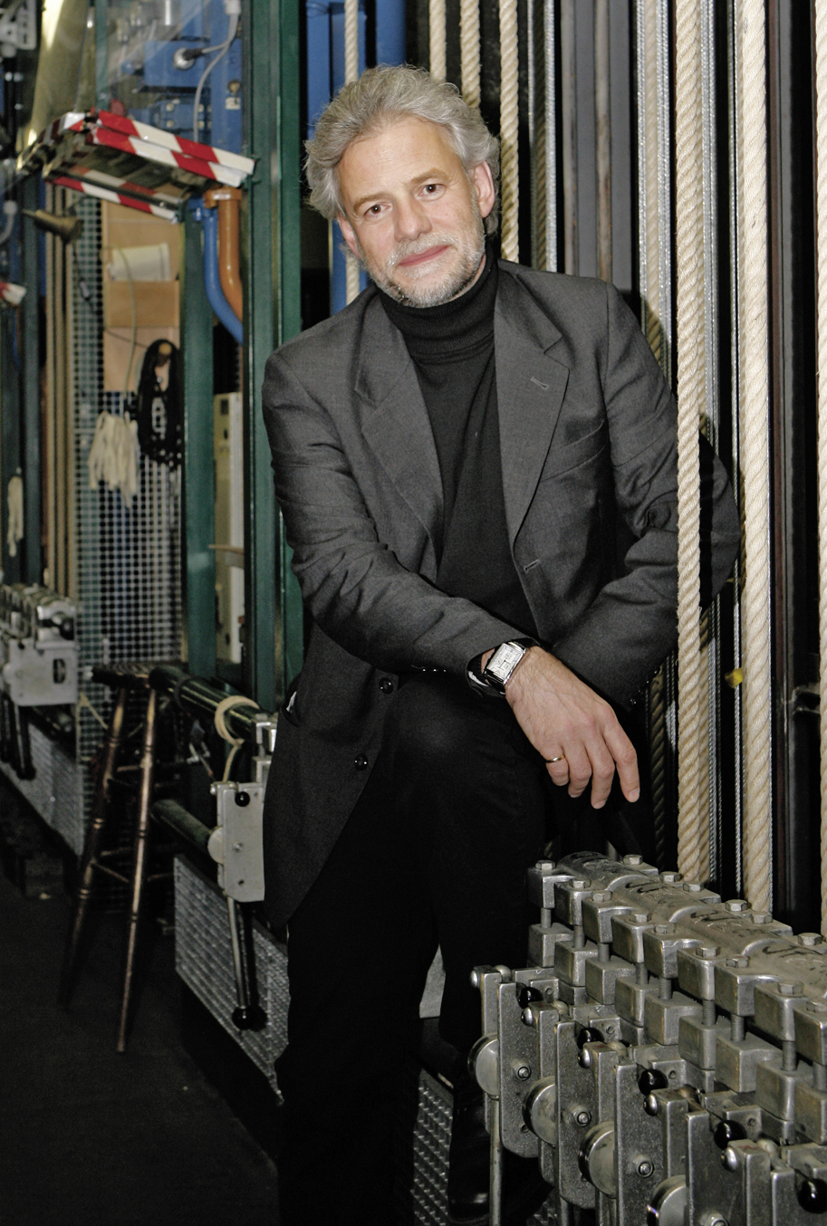 Dr. Ulrich Peters, Generalintendant des Theater Münster